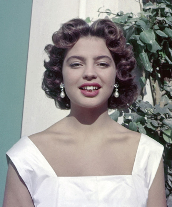 Ira von Fürstenberg